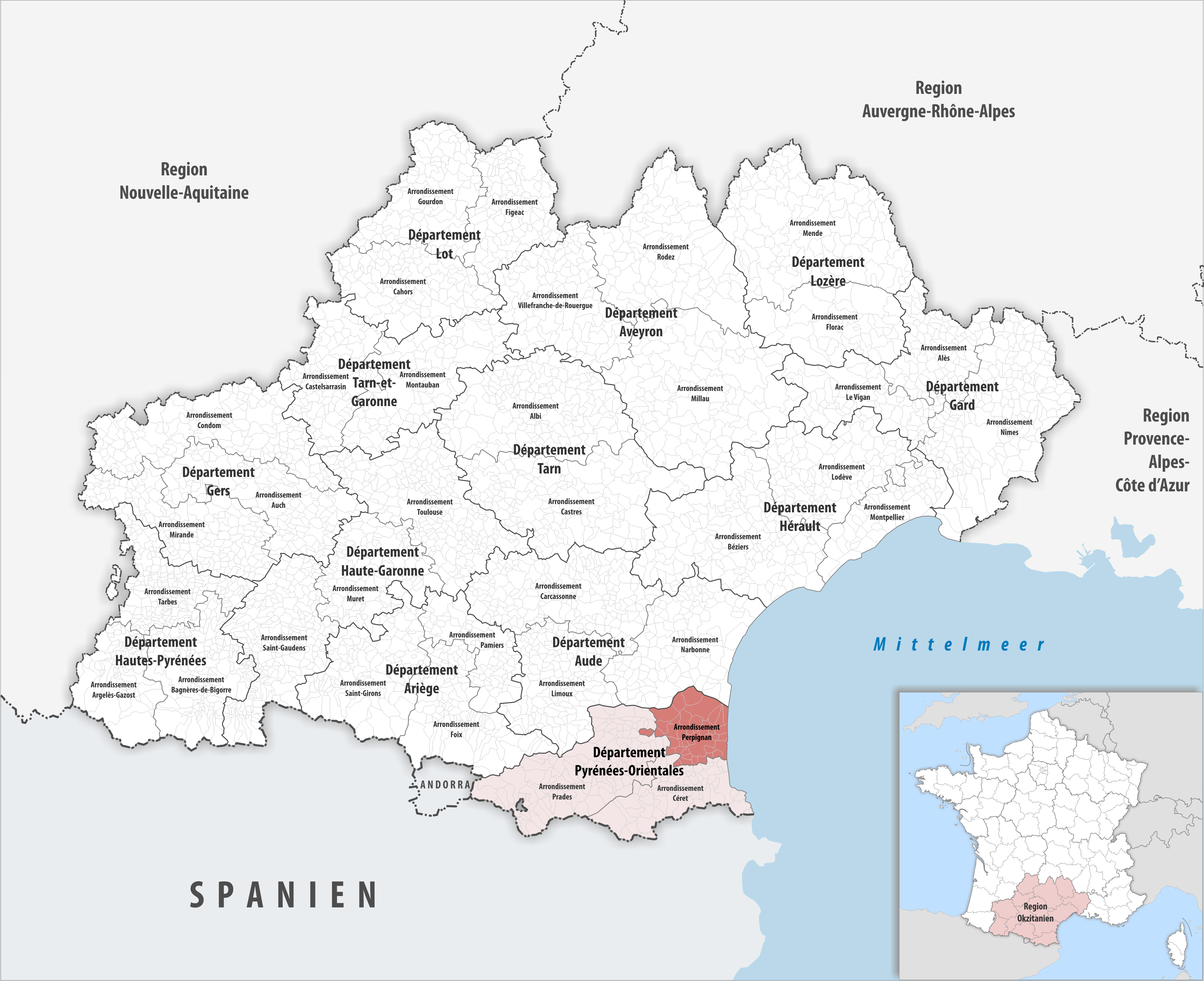 Lage des Arrondissements Perpignan